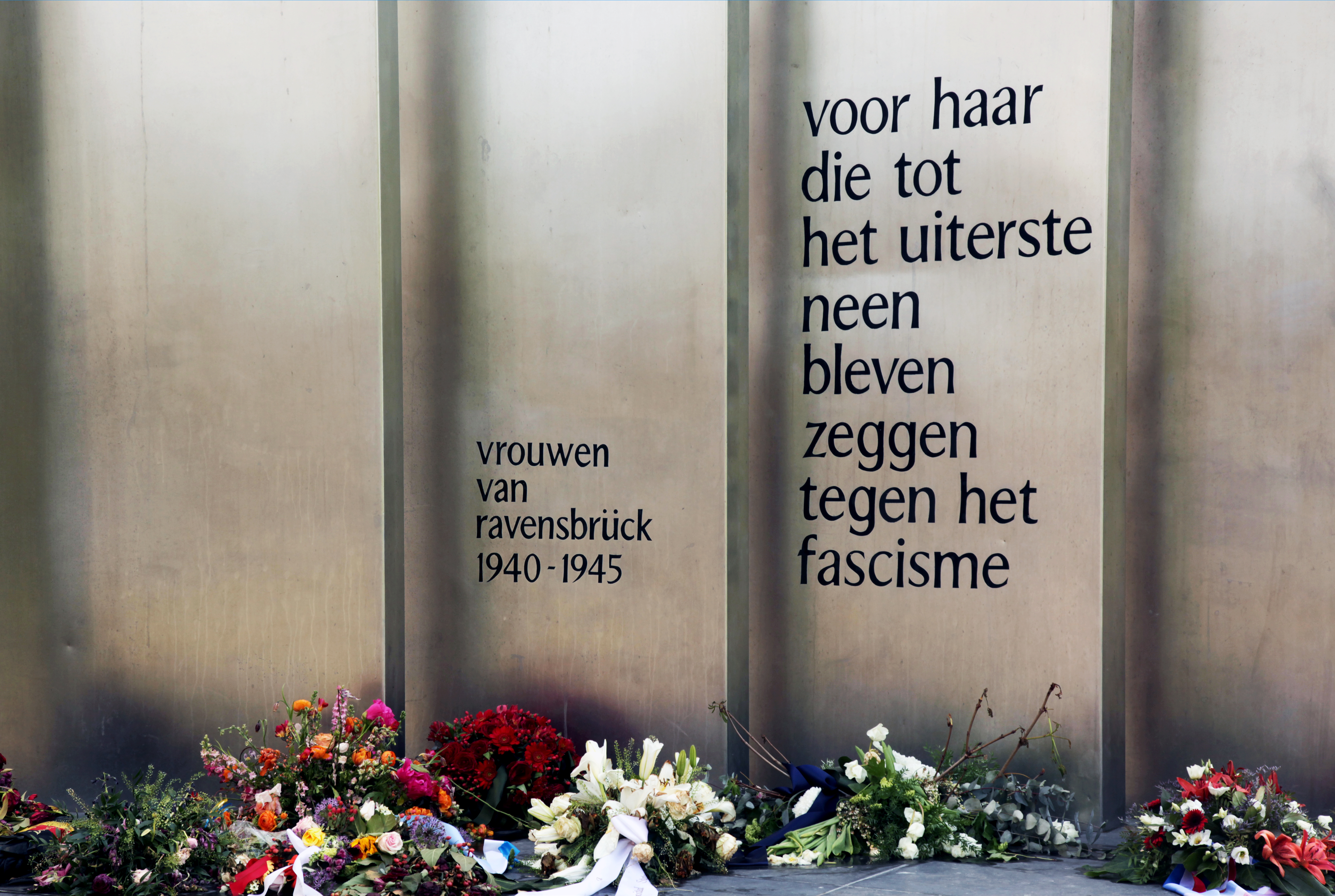 Museumplein - Vrouwen van Ravensbürg